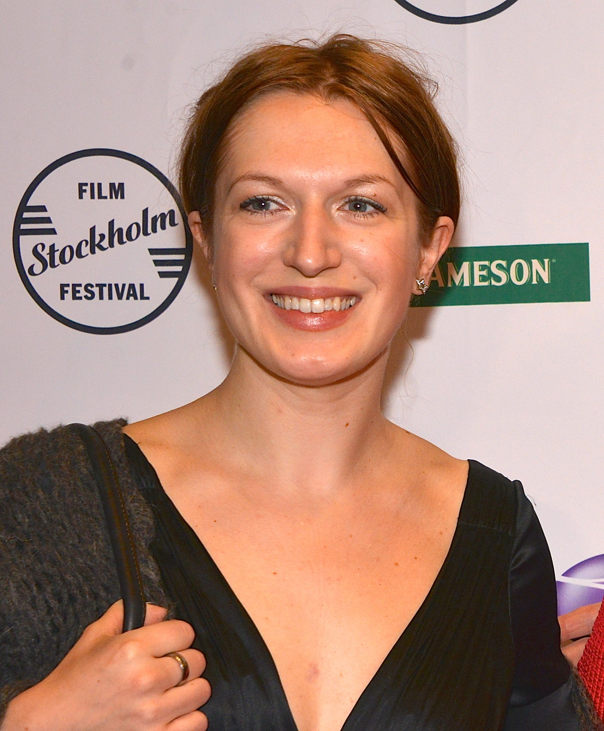 Yohanna Troell på Stockholms Filmfestival 10 november 2012.